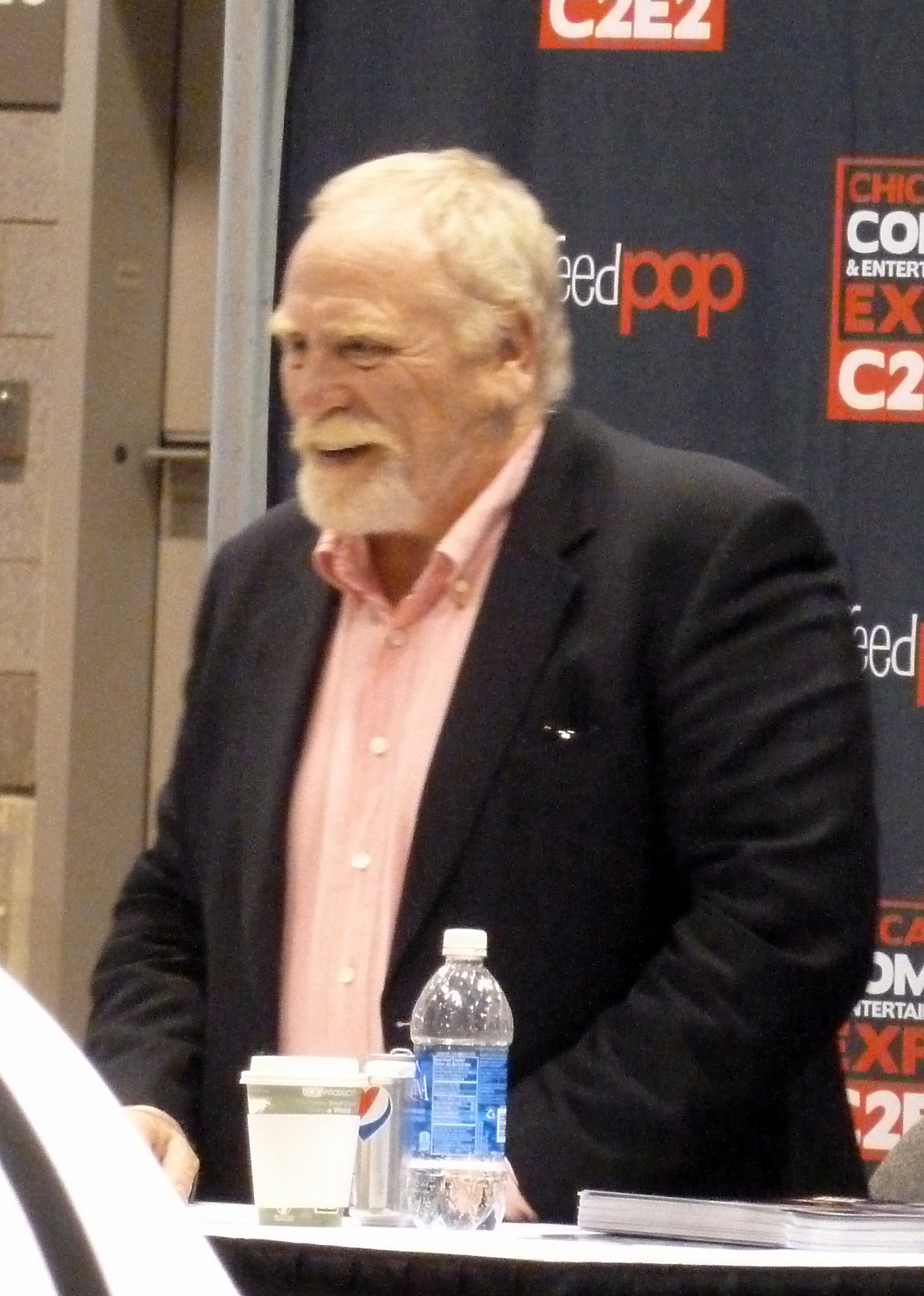 James Cosmo 03